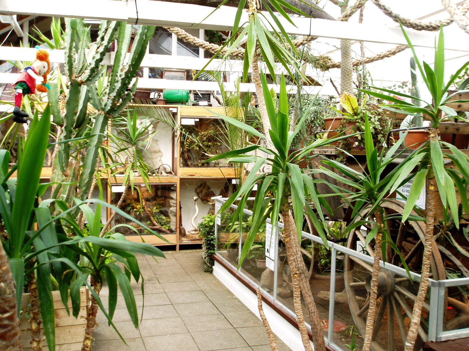 Malmö reptilcenter, Folkets park, Malmö